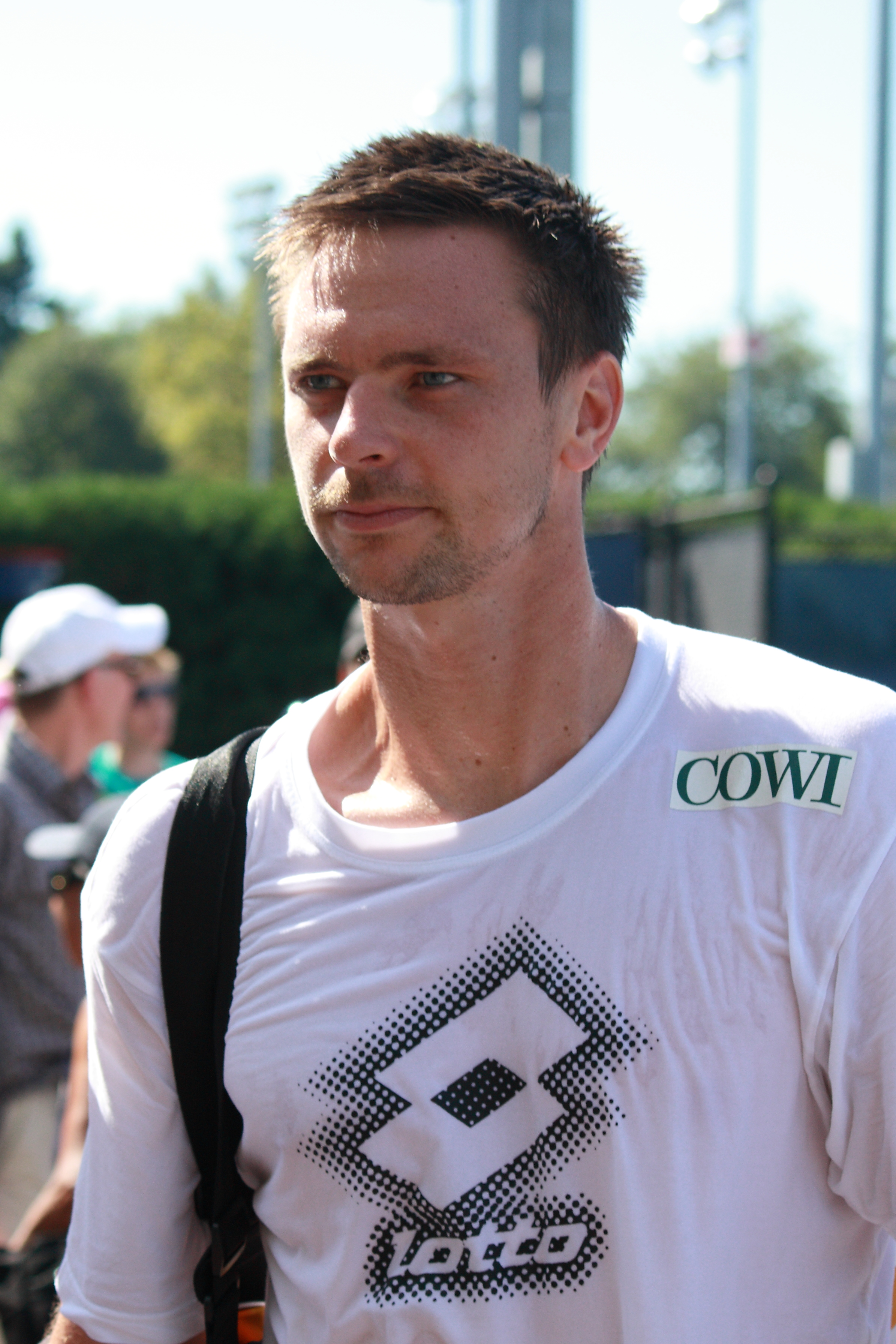 Robin Soderling at US Open 2010